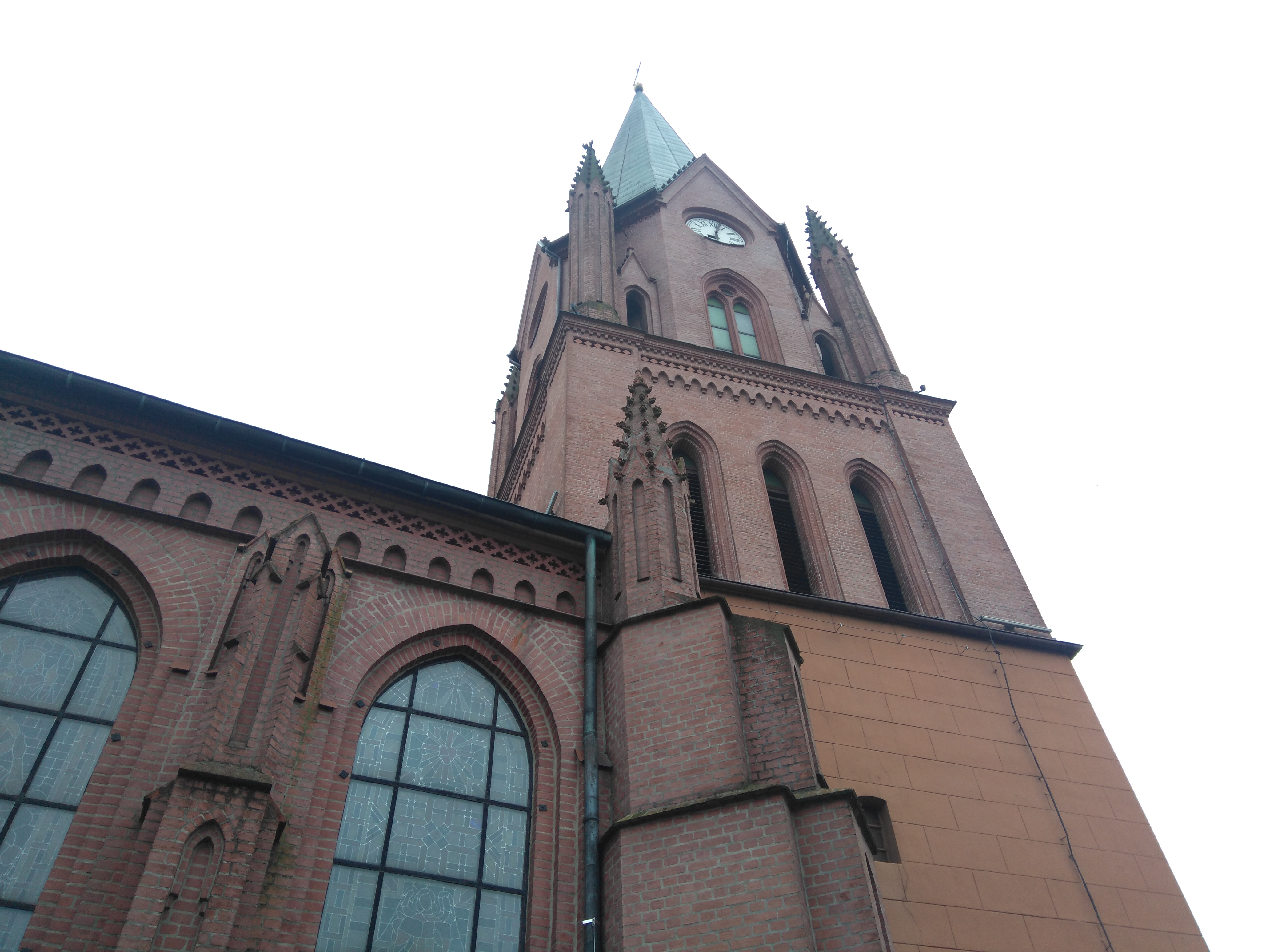 Połczyn-Zdrój - rzymskokatolicki kościół parafialny p.w. Matki Boskiej Nieustającej Pomocy, kon. XIX